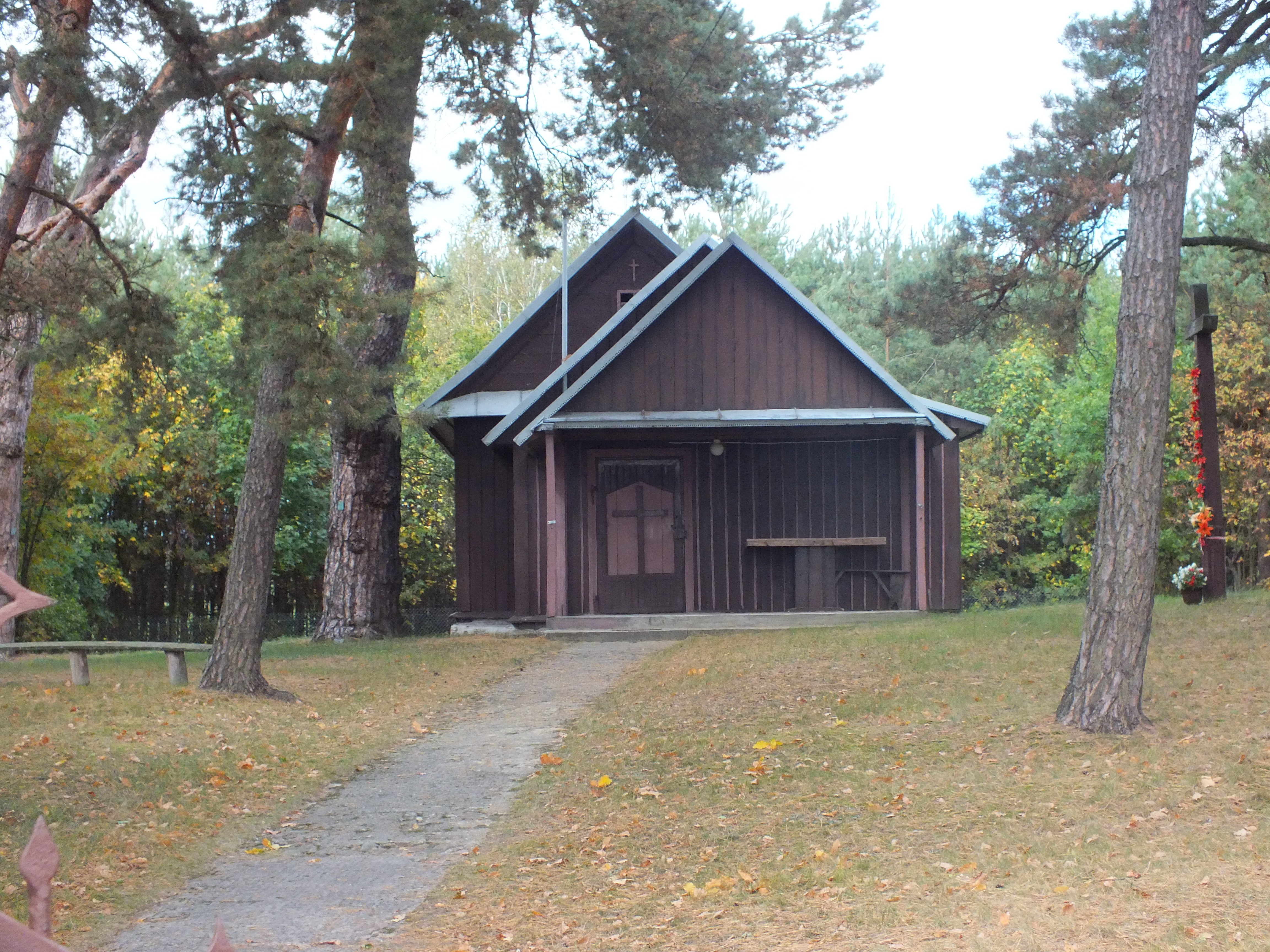 Kołczyn, kaplica cmentarna p.w. św. Anny, XIX